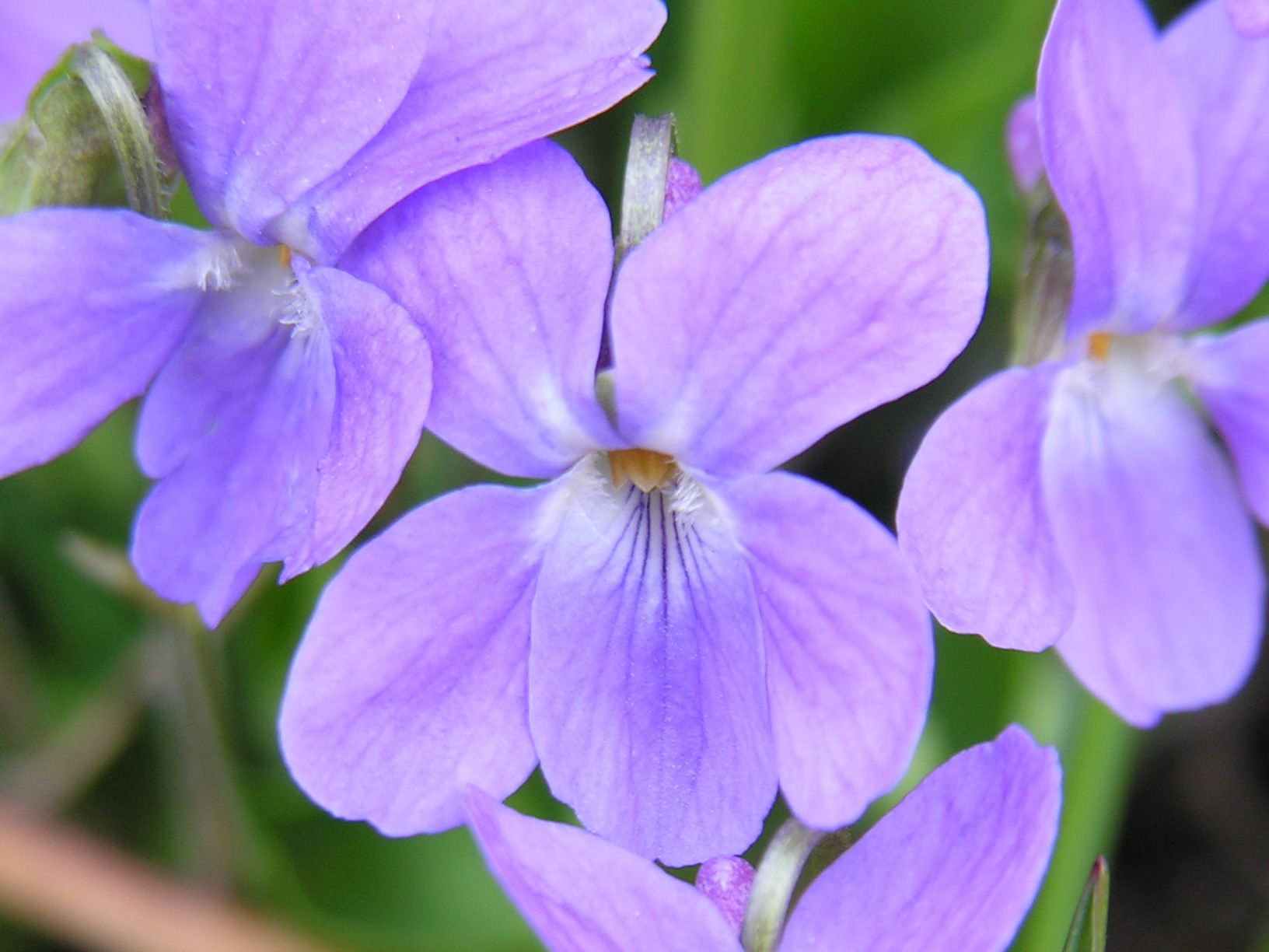 Našlaitė pašepėlė (Viola hirta) Šeima. Našlaitiniai (Violaceae) Fotografavo Algirdas, 2006 m. balandžio 29 d., Lietuva.